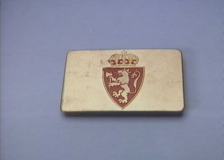 Norsk politiskjold fra Den norske Brigade i Sverige. Skjoldet inngår i gjenstandssamlingen til det danske Nationalmuseet. Fotograf: Elisabeth Halgreen.